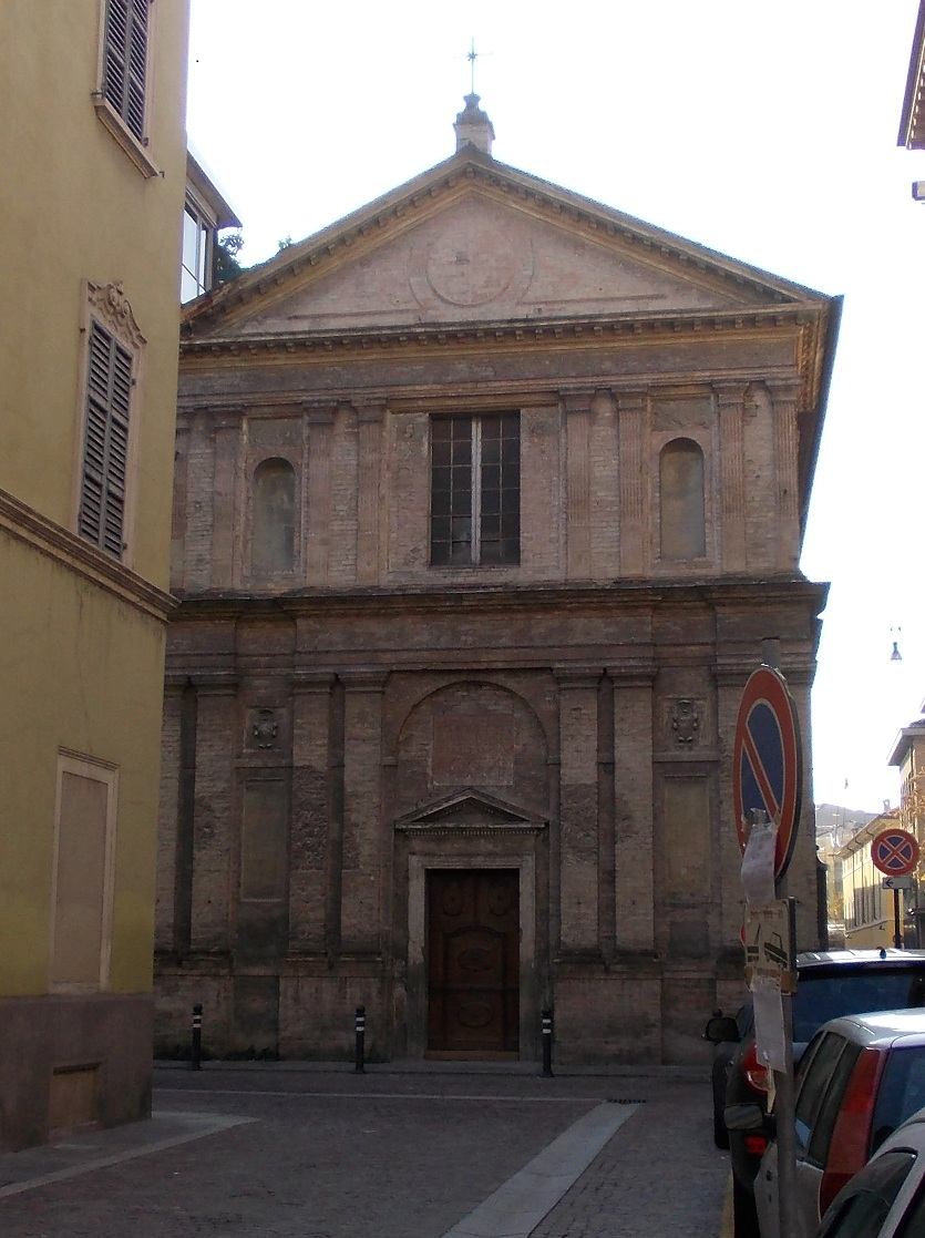 La facciata dell'ex chiesa di San Marcellino, Parma